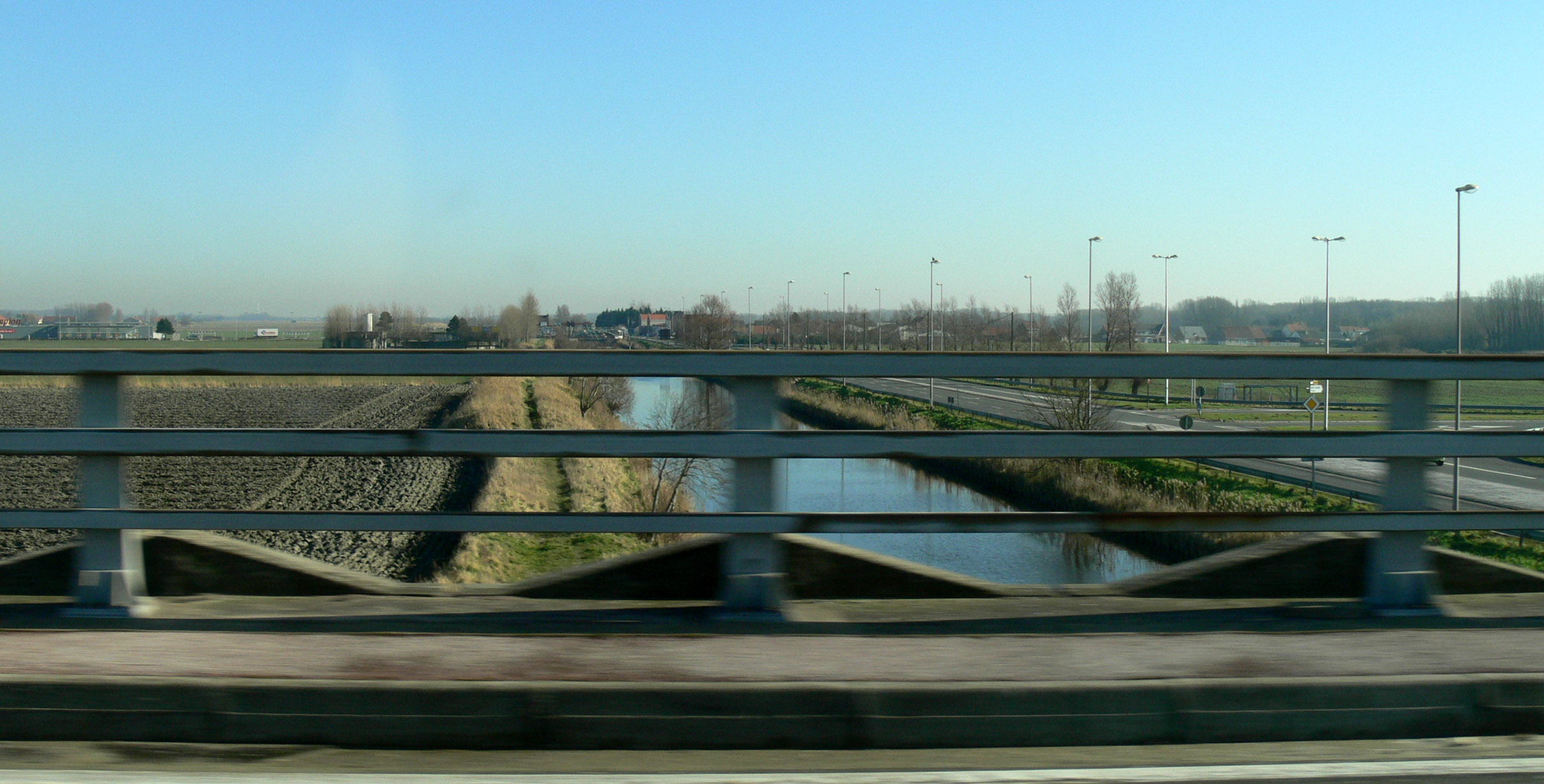 paysage poldérien des moëres, drainés par des fossés dits "watringues" ou "watergang", Flandres maritimes, côté français. Cette zone est aujourd'hui située à environ 2 m sous le niveau moyen de la mer.